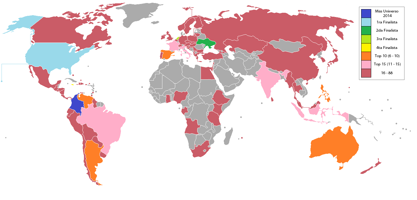 Miss Universo 2014 mapa